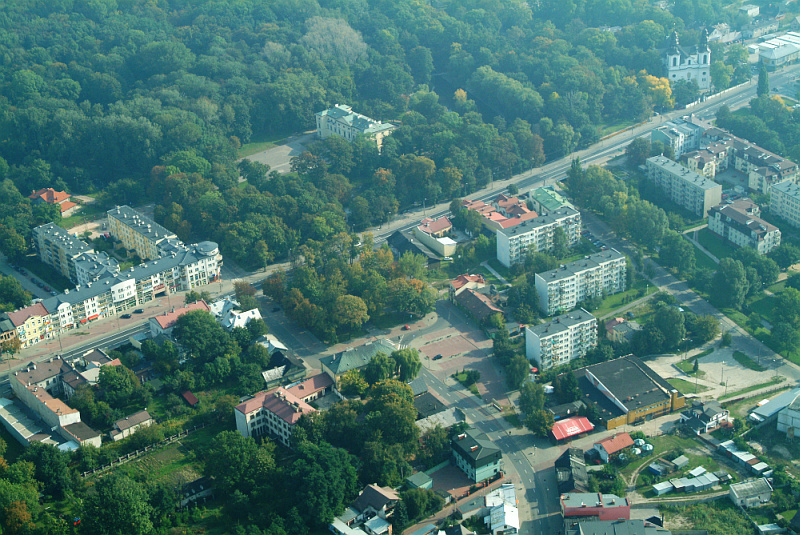 Zdjęcie lotnicze placu Kilińskiego w Mińsku Mazowieckim. Plac powstał, jako renesansowy rynek Miasta Sendomierz znajdującego się obecnie na terenie Mińska Mazowieckiego. Ulica przechodząca z lewej do prawej strony zdjęcia to ulica Warszawska, nad nią znajduje się park i pałac Dernałowiczów,w prawym górnym rogu znajduje się kościół pw. NNMP, ulica wchodząca w plac od dołu zdjęcia to obecna ulica Piłsudskiego (historyczny Trakt Karczewski. Obecnie rozpoczęły się prace budowlane na terenie parkingu w centralnej części zdjęcia uzupełniające zabudowę południowej pierzeii rynku.